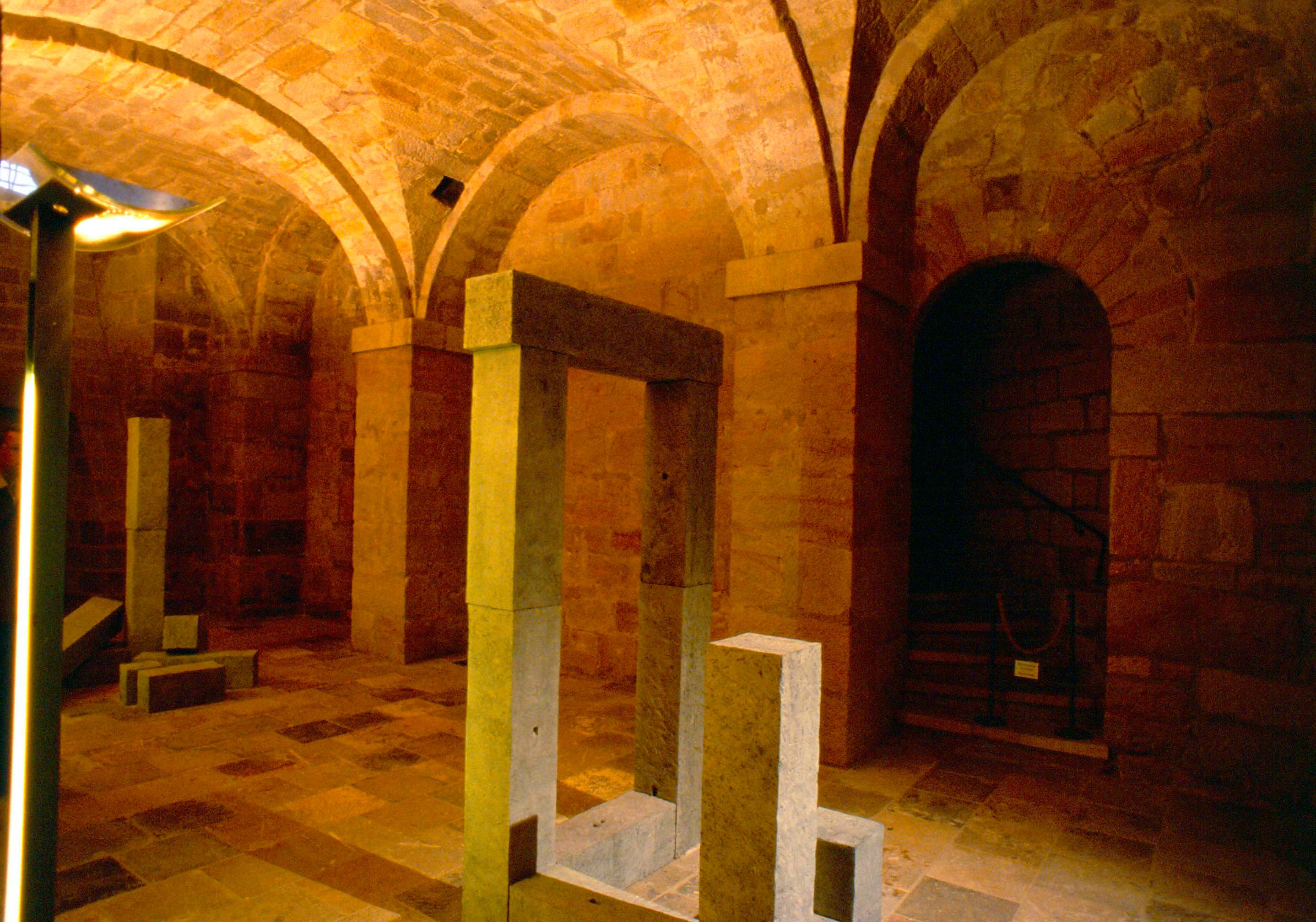 Chorkapelle in der Unterkirche der Dresdner Frauenkirche